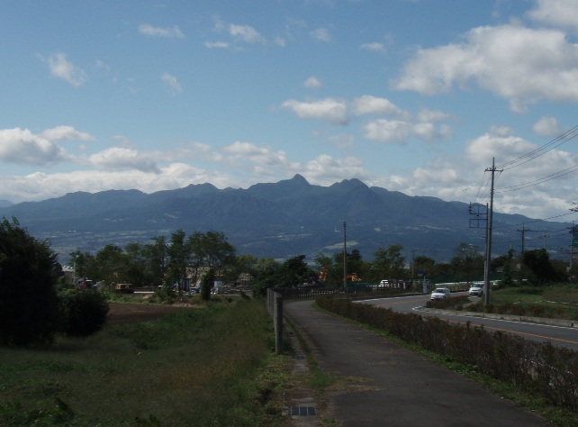 Mount Haruna.